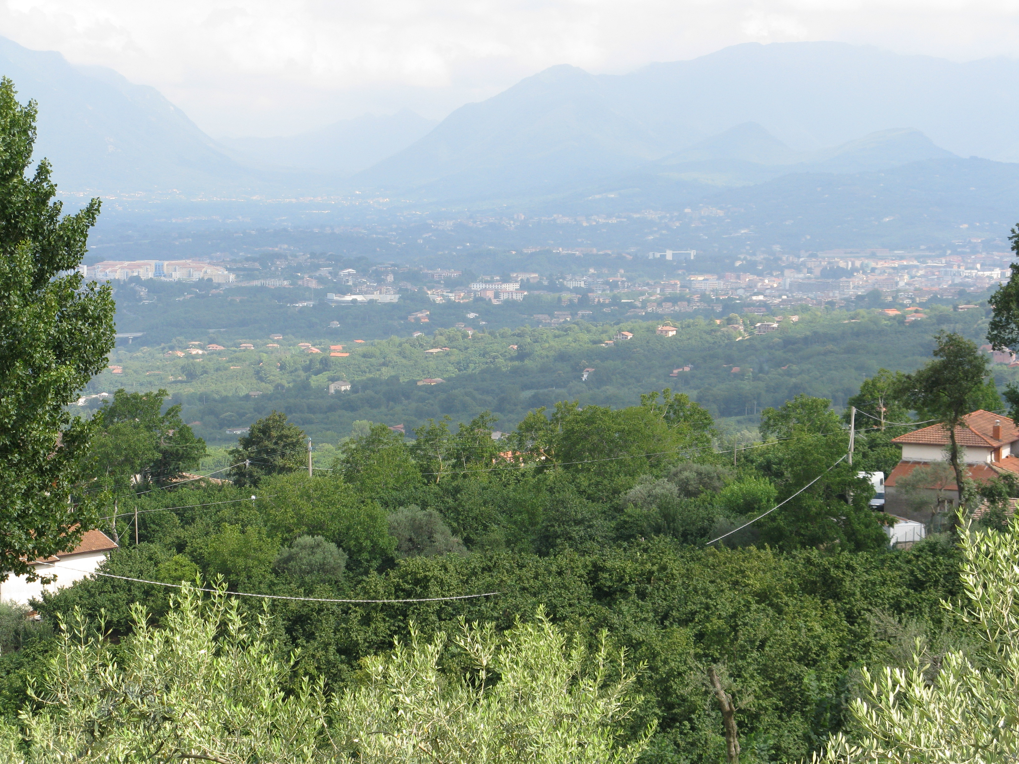 Paesaggio tipico della provincia di Avellino